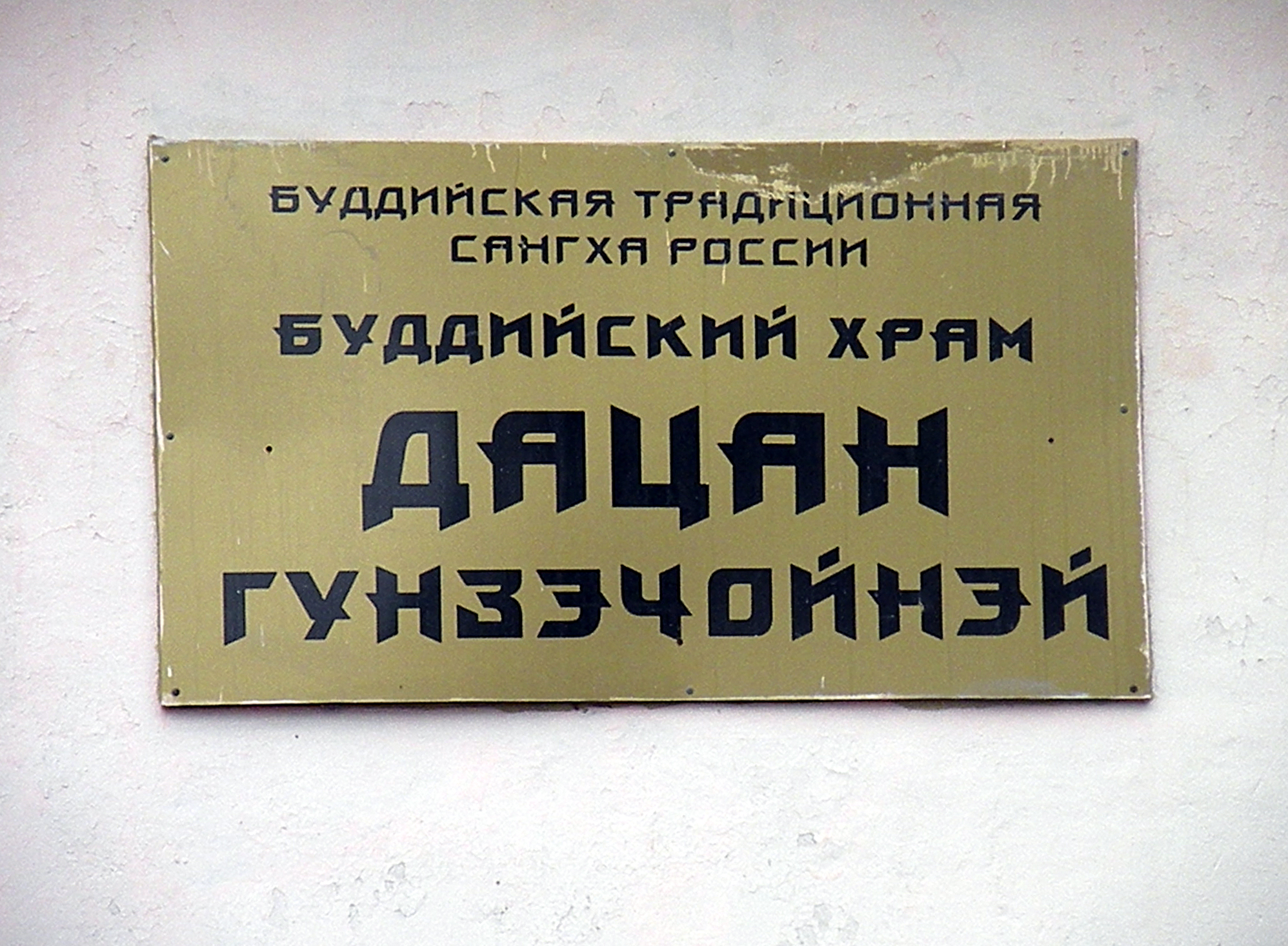 Подлинное наименование буддийского храма. СПб